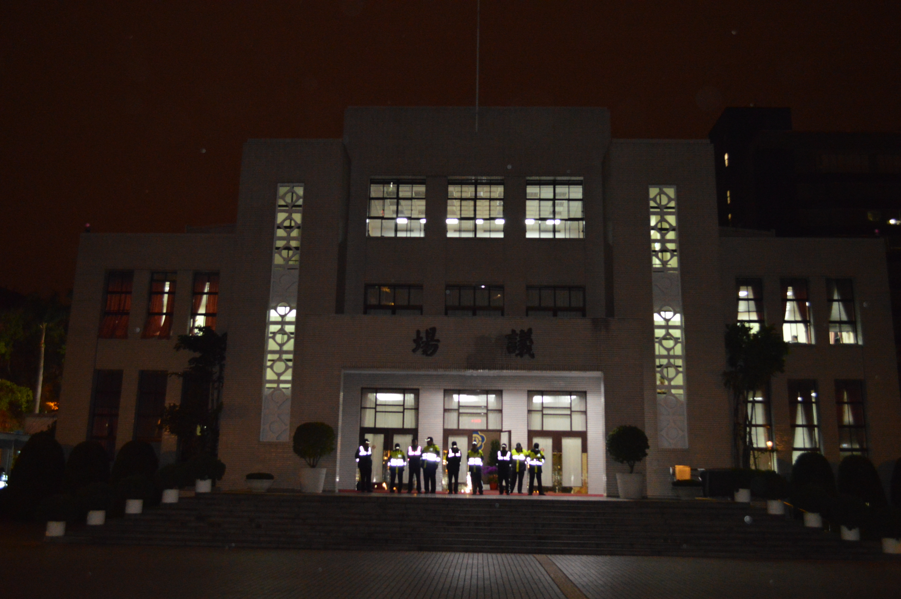 看似平靜的夜間立法院。